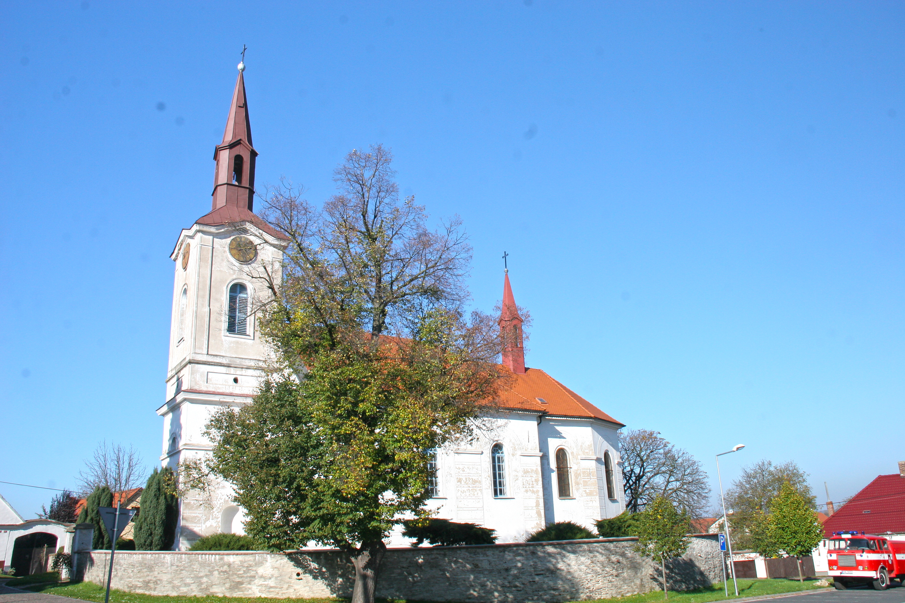 Kostel Všech svatých, Dolní Bučice.